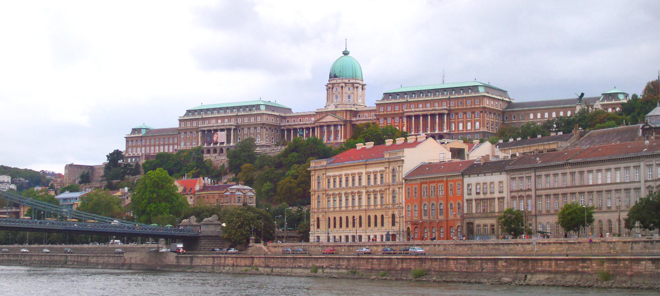 Castle (Budapest)